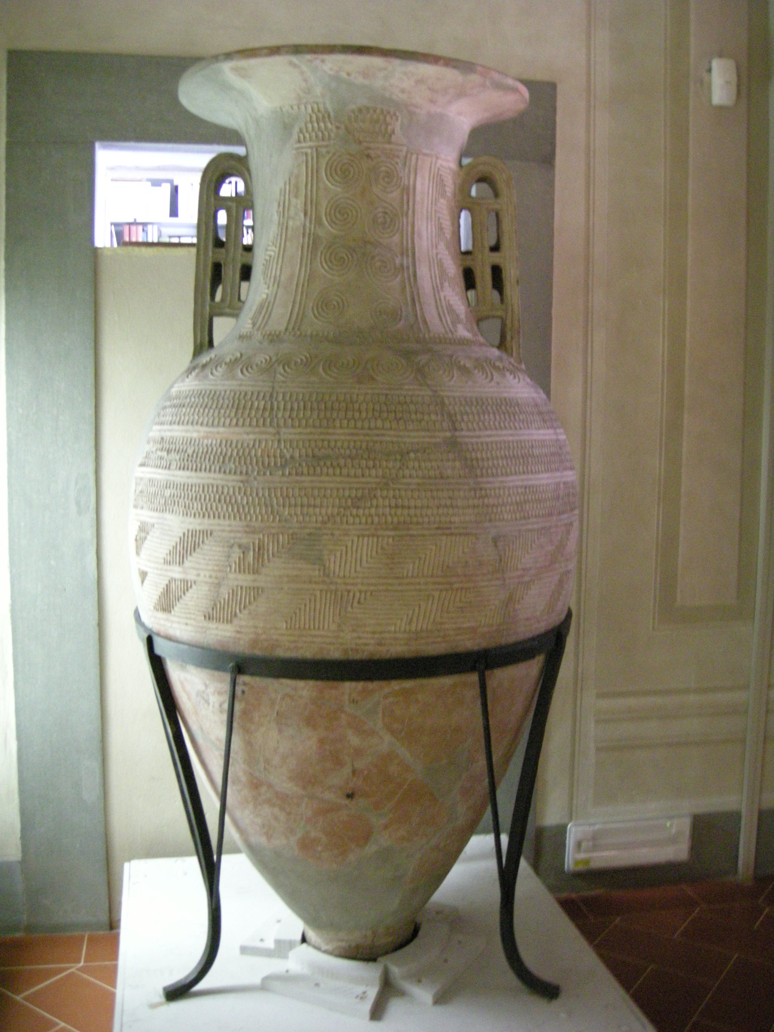 Phitos decorato a rilievo, 675 ac. circa